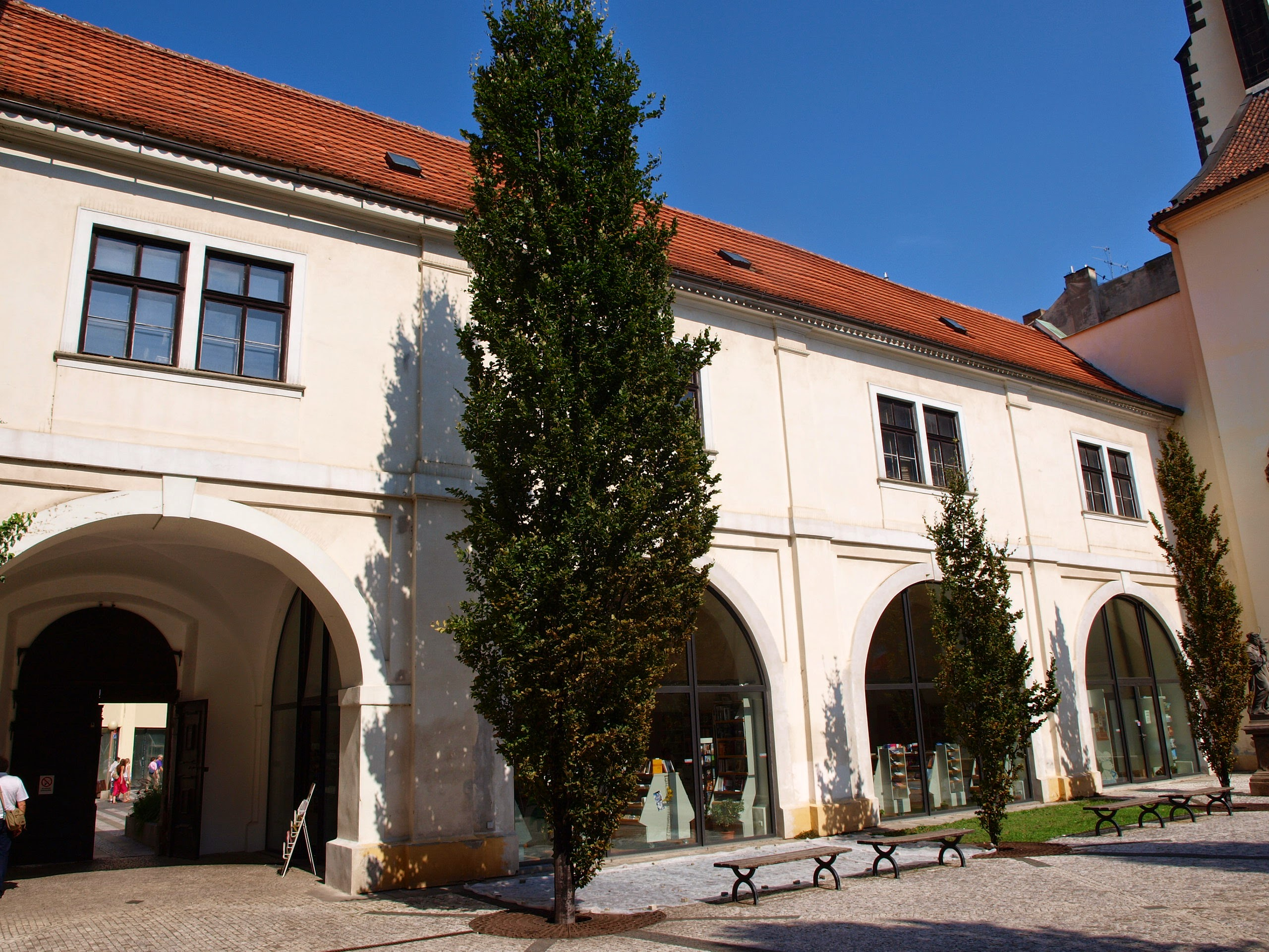 Kostel Panny Marie Sněžné, Praha